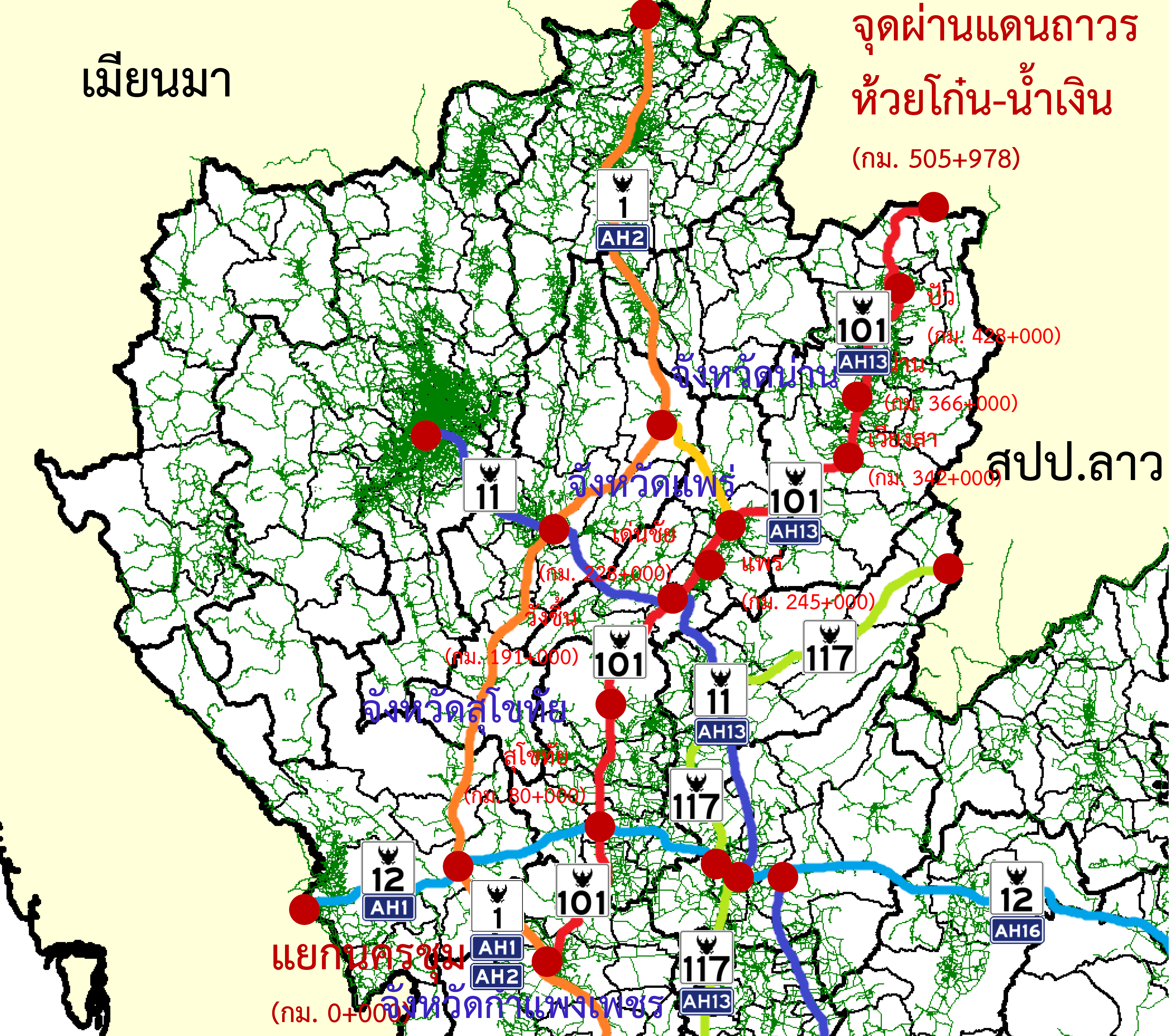 TH HW 101 MAP